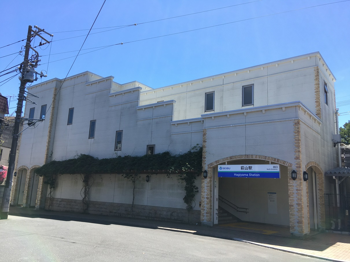 萩山駅北口